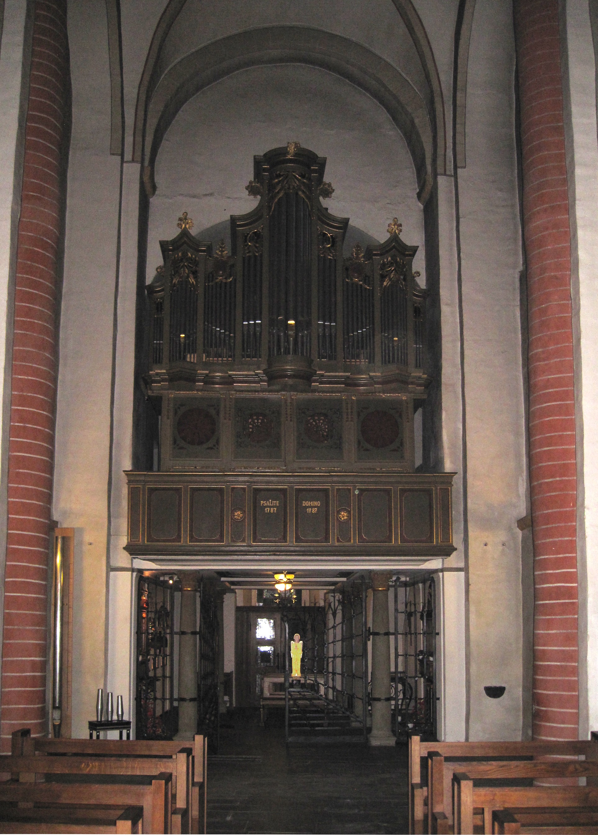 Historische Orgel aus dem Jahr 1787 (restauriert 1987) in der katholischen Kirche St. Clemens (alter Teil) in Drolshagen, Kirchplatz 3.